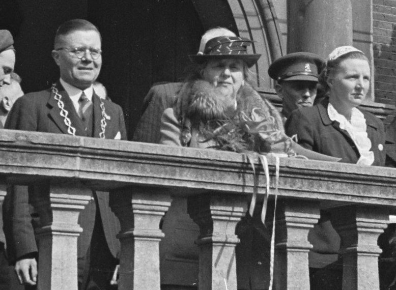 Collectie / Archief : Fotocollectie Anefo Reportage / Serie : Bezoek van koningin Wilhelmina en prinses Juliana aan Breda Beschrijving : Bezoek van koningin Wilhelmina en prinses Juliana aan Breda. Het koninklijk gezelschap wordt toegejuicht op het bordes van het stadhuis. Datum : 2 mei 1945 Locatie : Breda, Noord-Brabant Trefwoorden : auto's, burgemeesters, koninginnen, prinsessen Persoonsnaam : Haperen, A. van, Juliana (prinses Nederland), Mierlo, E.L.H.M. van, Smits, Ch., Struycken, A. , Wilhelmina (koningin Nederland) Fotograaf : Poll, Willem van de / Anefo Auteursrechthebbende : Nationaal Archief Materiaalsoort : Negatief (zwart/wit) Nummer archiefinventaris : bekijk toegang 2.24.01.03 Bestanddeelnummer : 900-2744